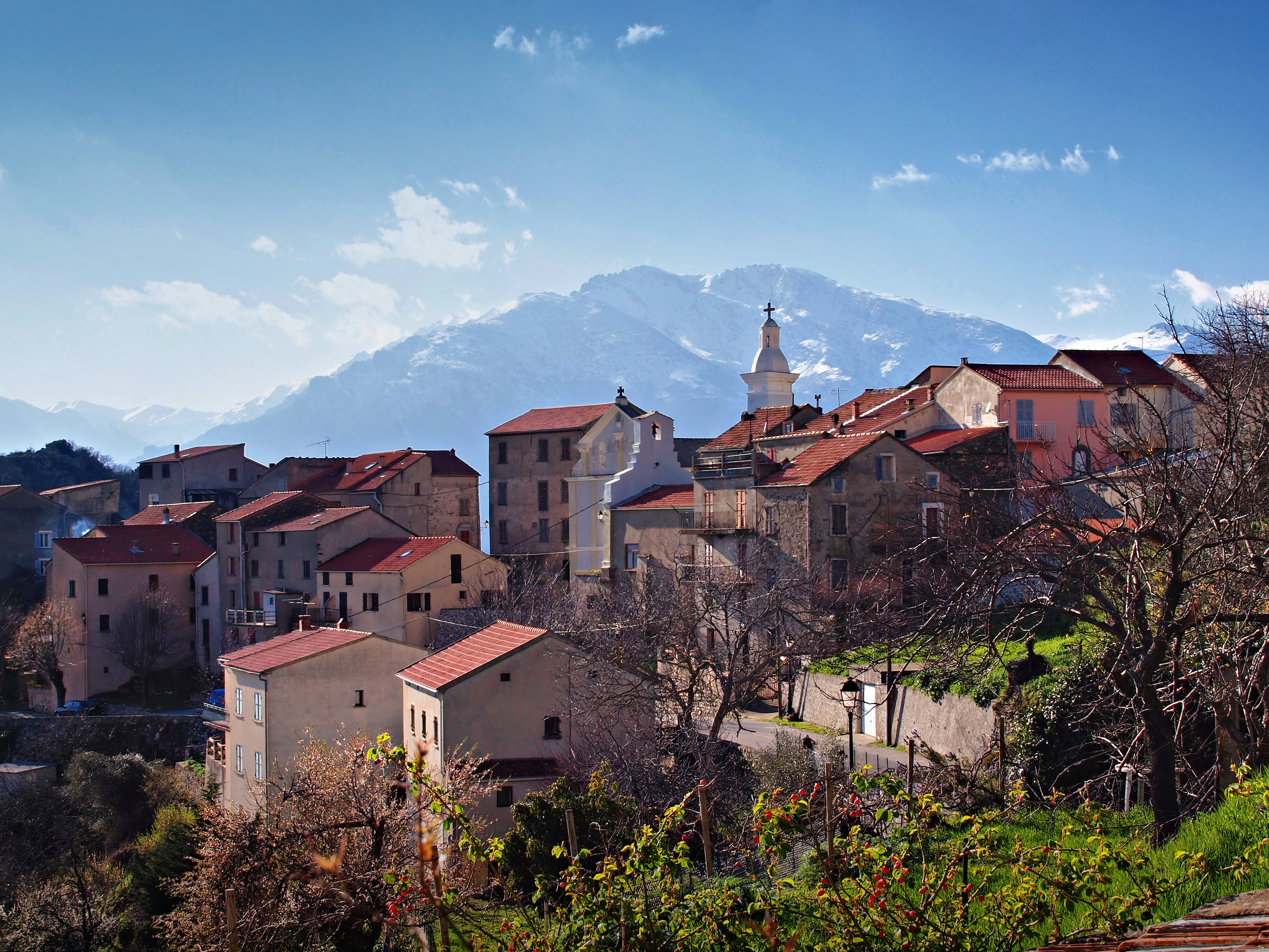 Altiani (Corse) - Vue du village depuis la route de Focicchia